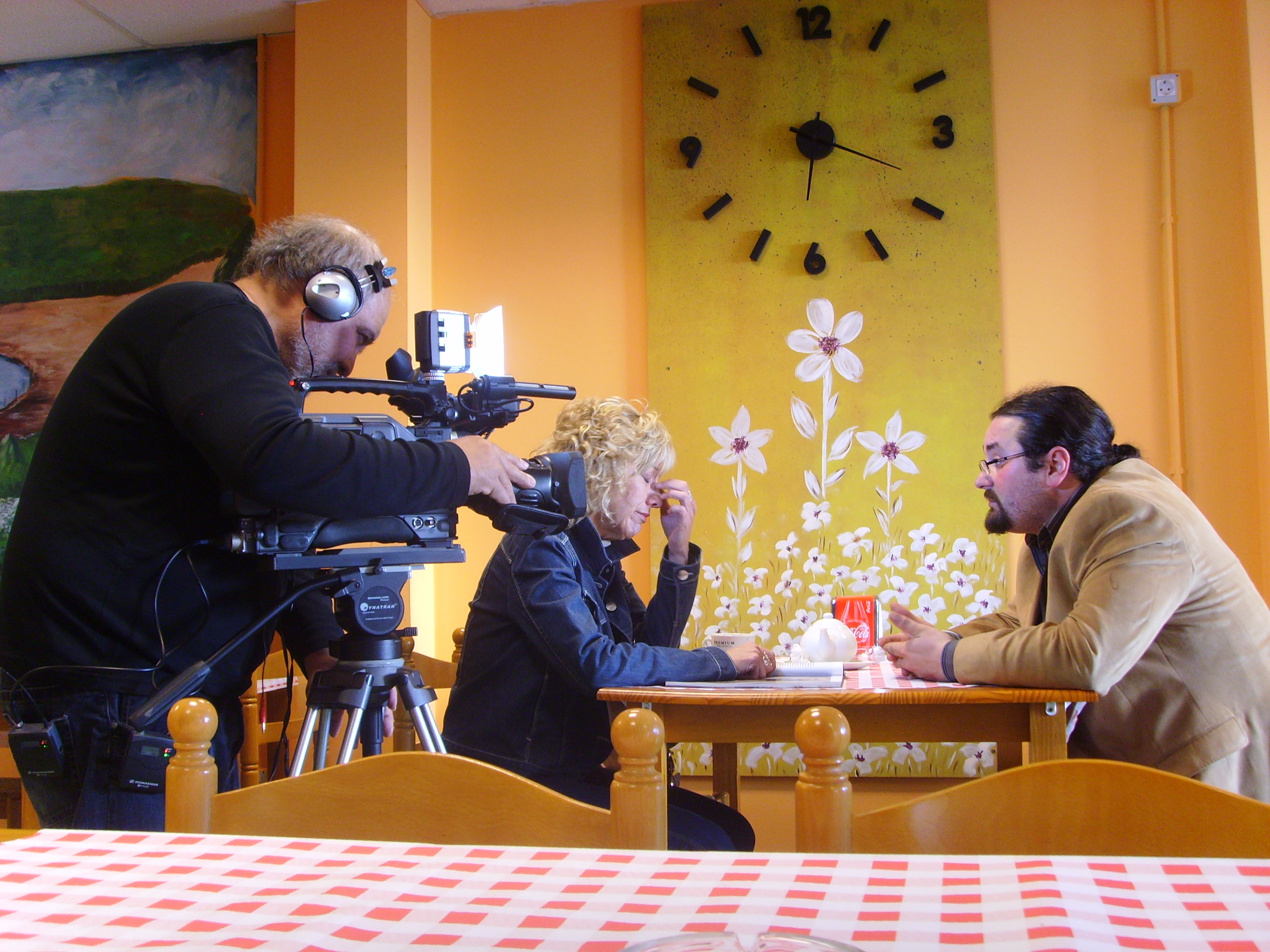 Grabación de una escena del largometraje "Donde me lleves" de Gilberto Varela, el 4 de agosto de 2010 en La Muela, Zaragoza, foto tomada por Frederic Varela, asistente de rodaje